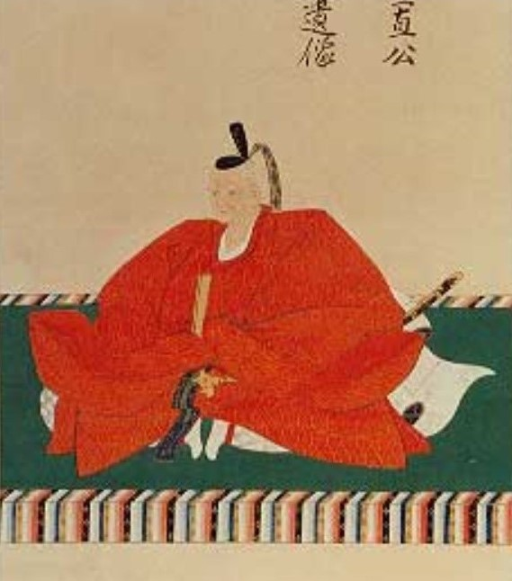 溝口宣直の肖像。